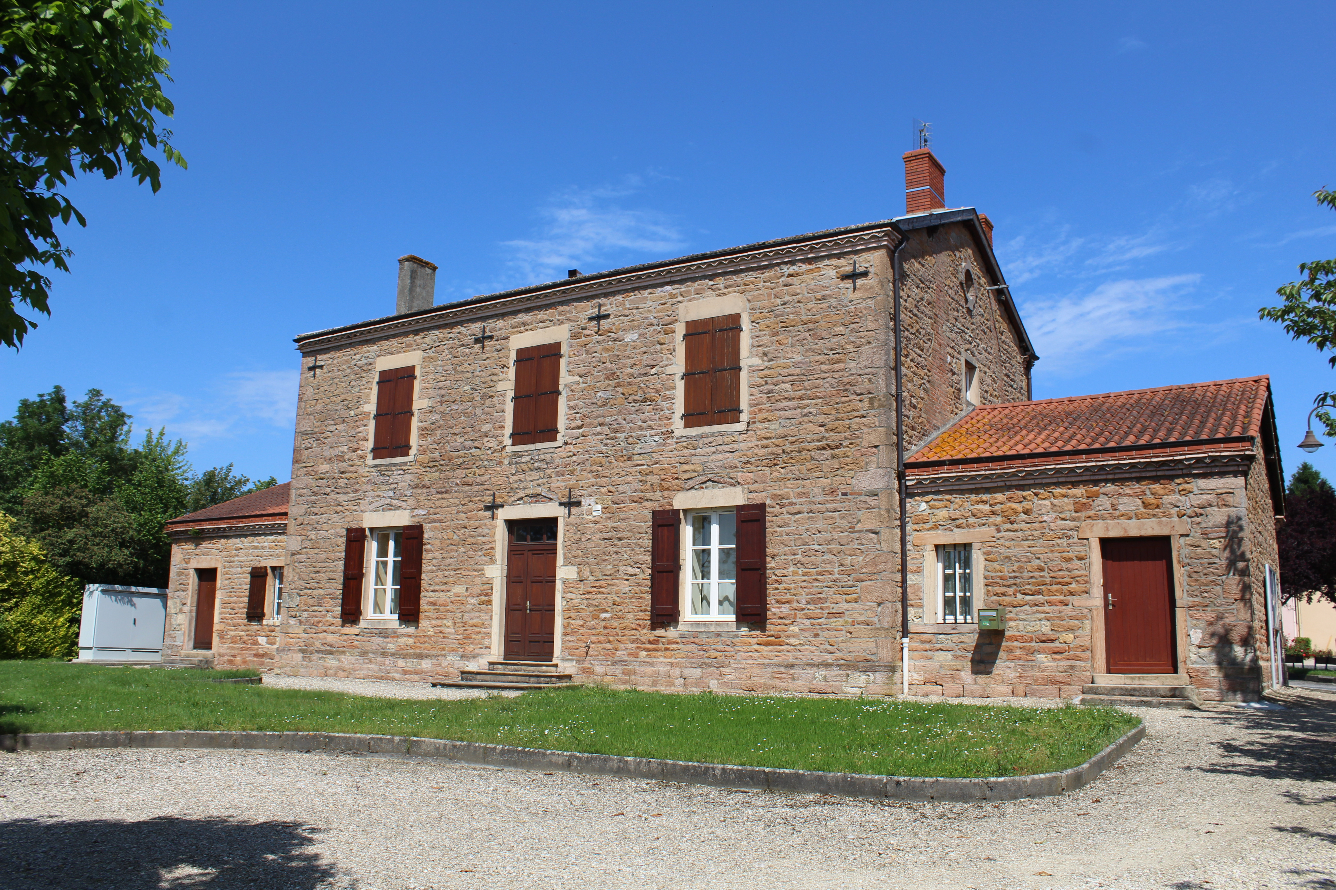 Façade arrière de la mairie de Saint-Genis-sur-Menthon.